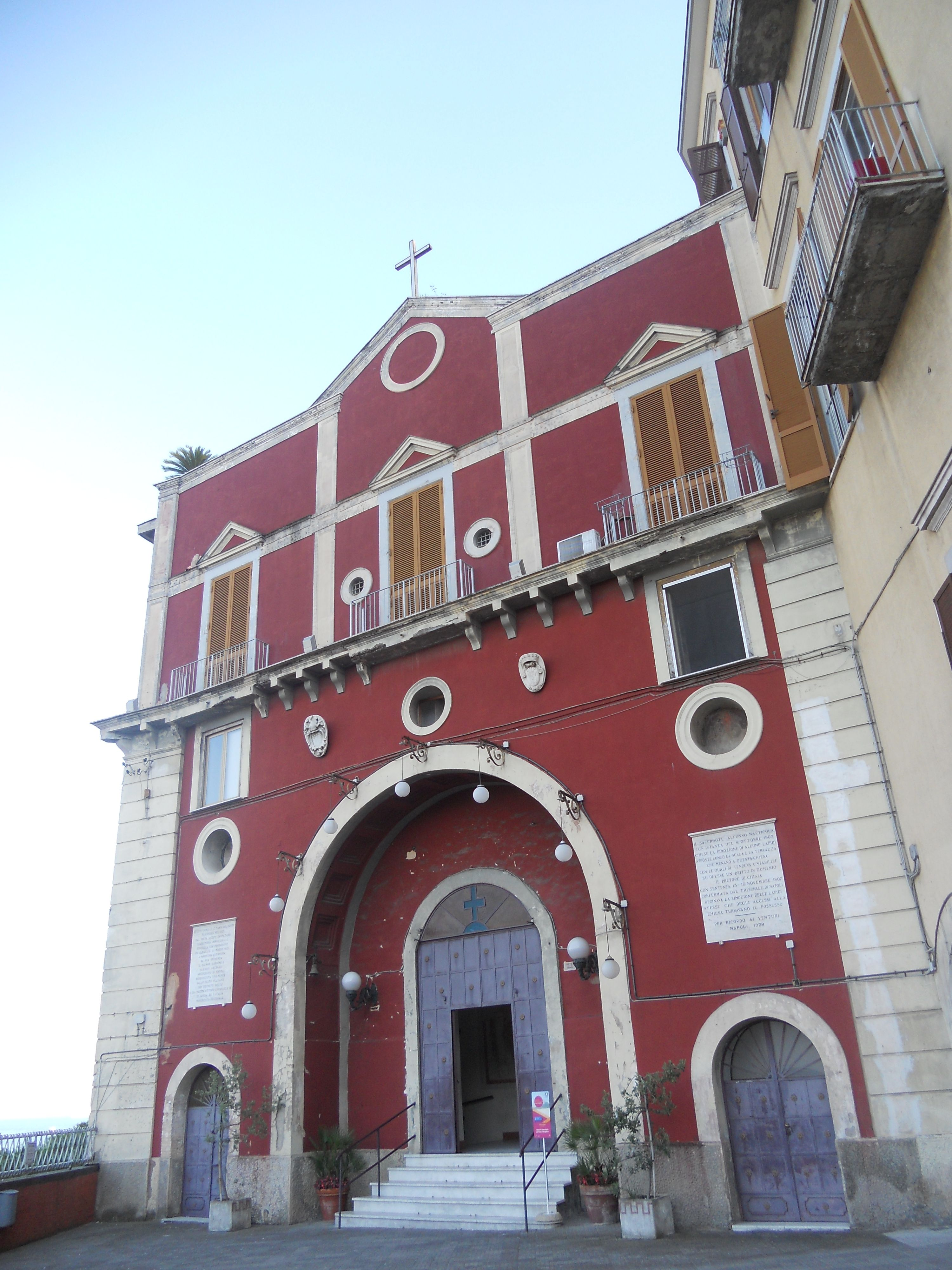 Facciata Santa Maria del Parto, Napoli